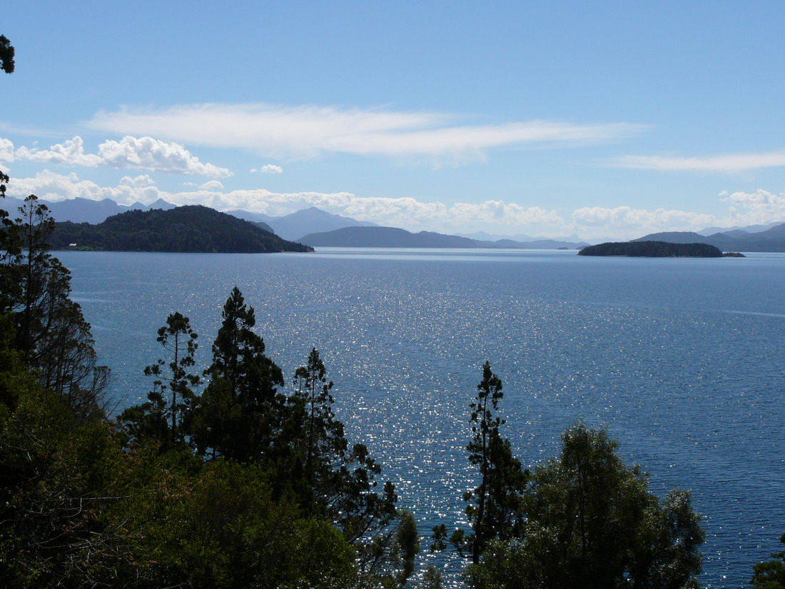 Nahuel Huapi lake